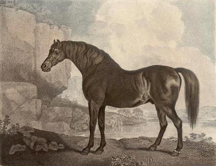 Famous stallion